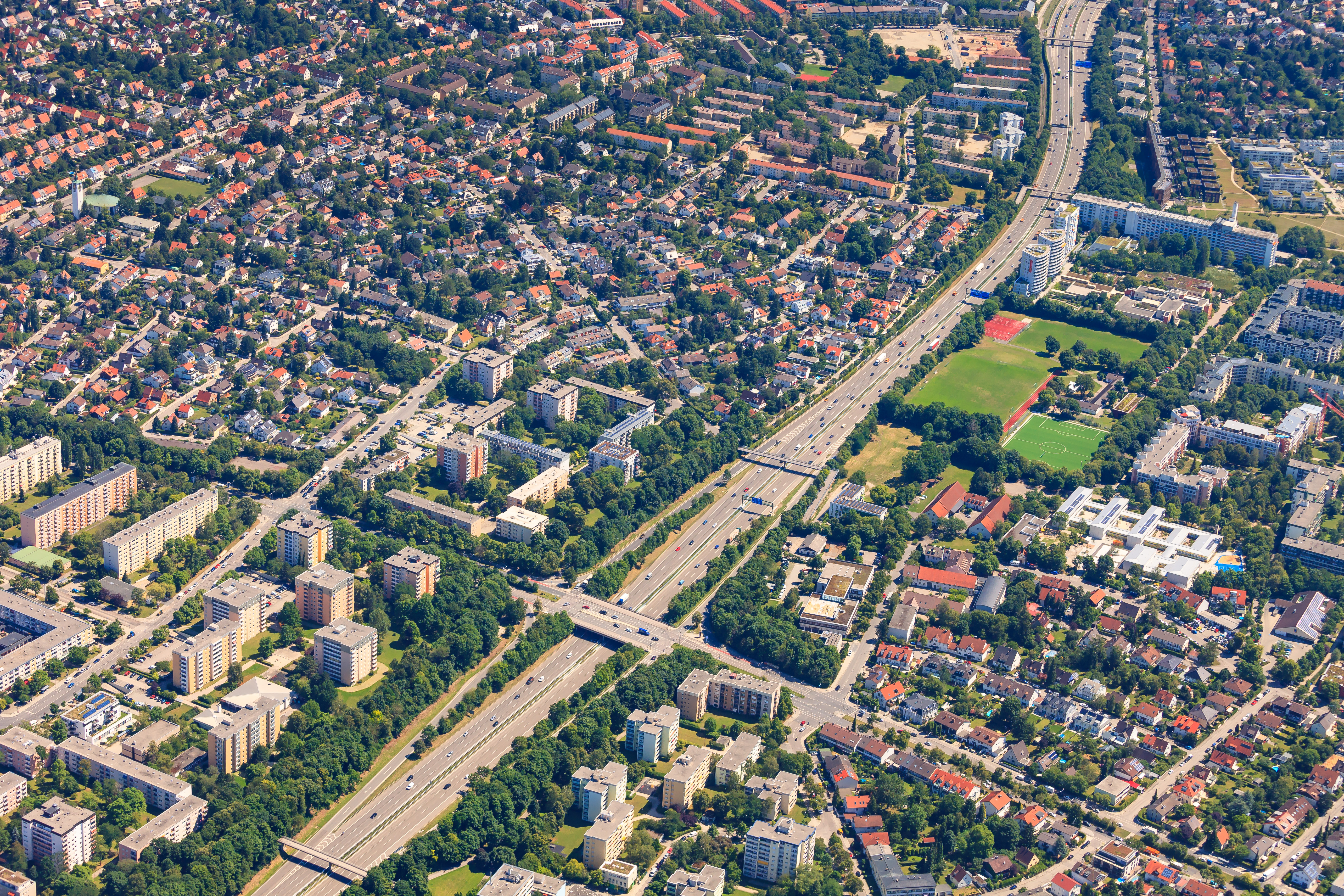 München-Kleinhadern, Luftbild